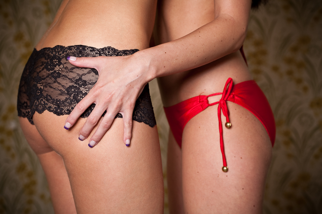 Jana & Nella